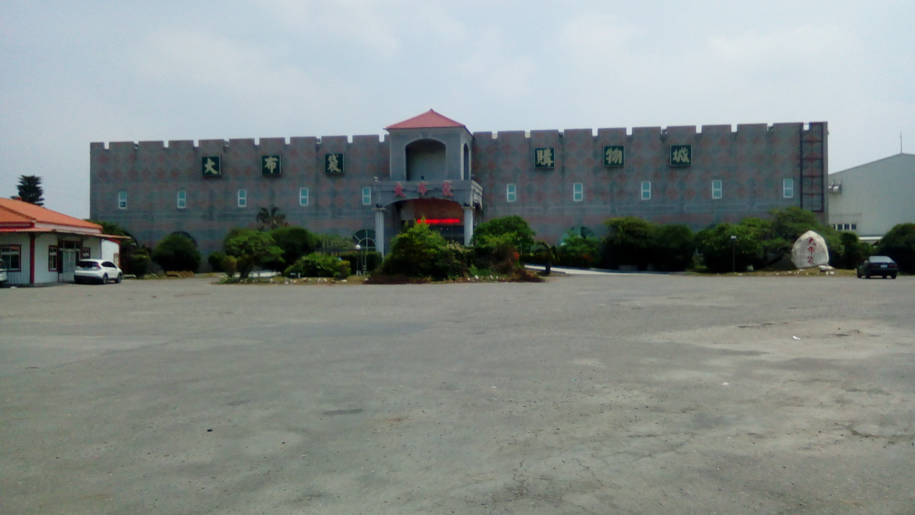 位於布袋鎮市區東方，台17線旁